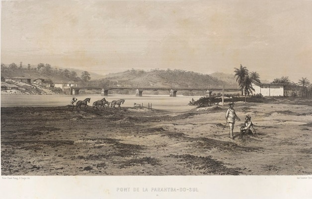 Catalogado e presente na Fundação Biblioteca Nacional